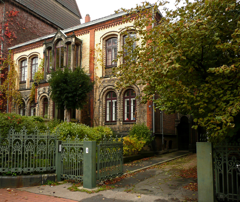 Villa Stephanus }